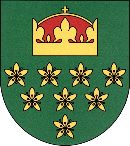 znak, Dolní Hbity, okres Příbram